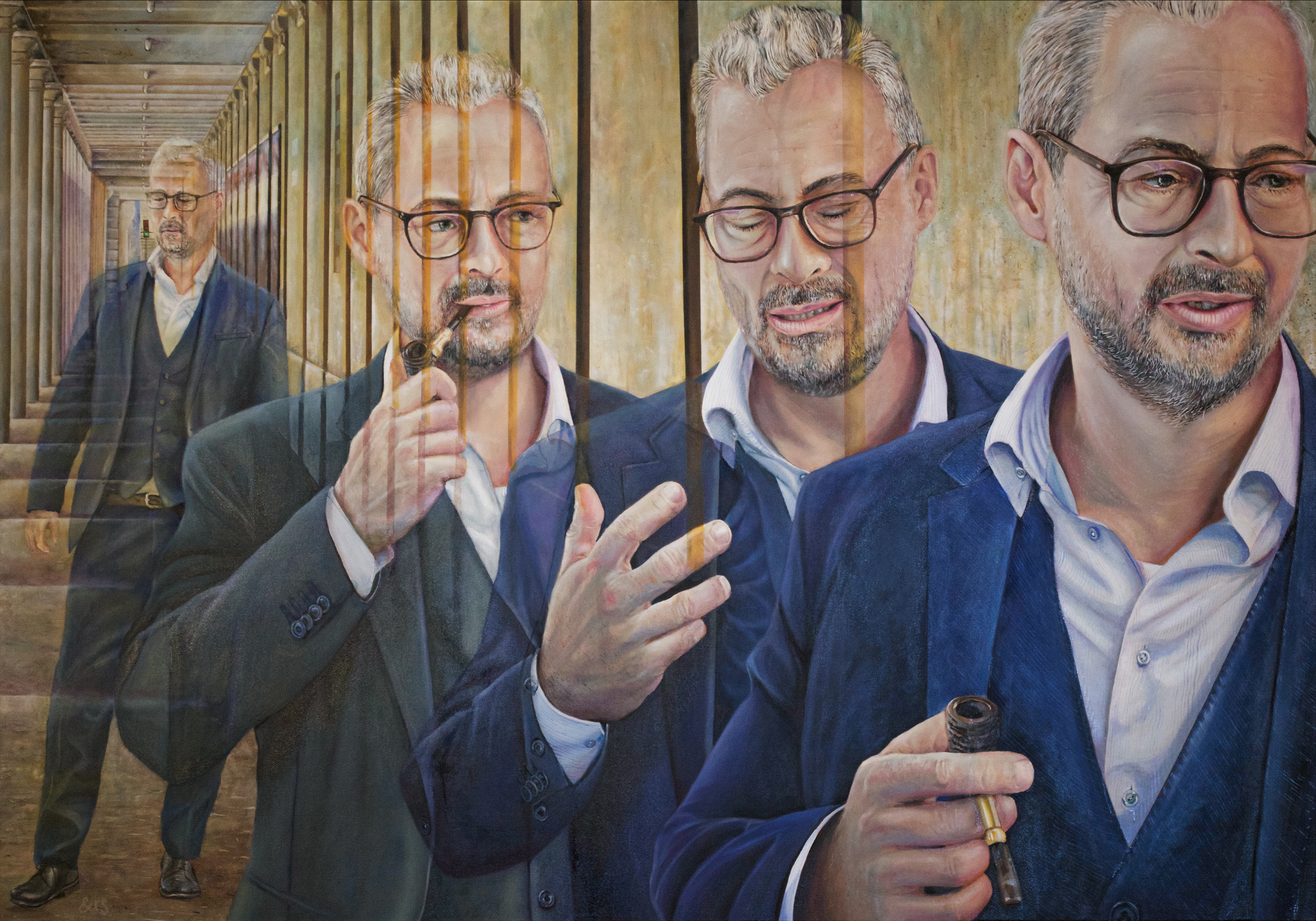 Title #0F, (Rane Willerslev), Akryl og olie på lærred 200x140cm, 2018, Anders Dyhr.